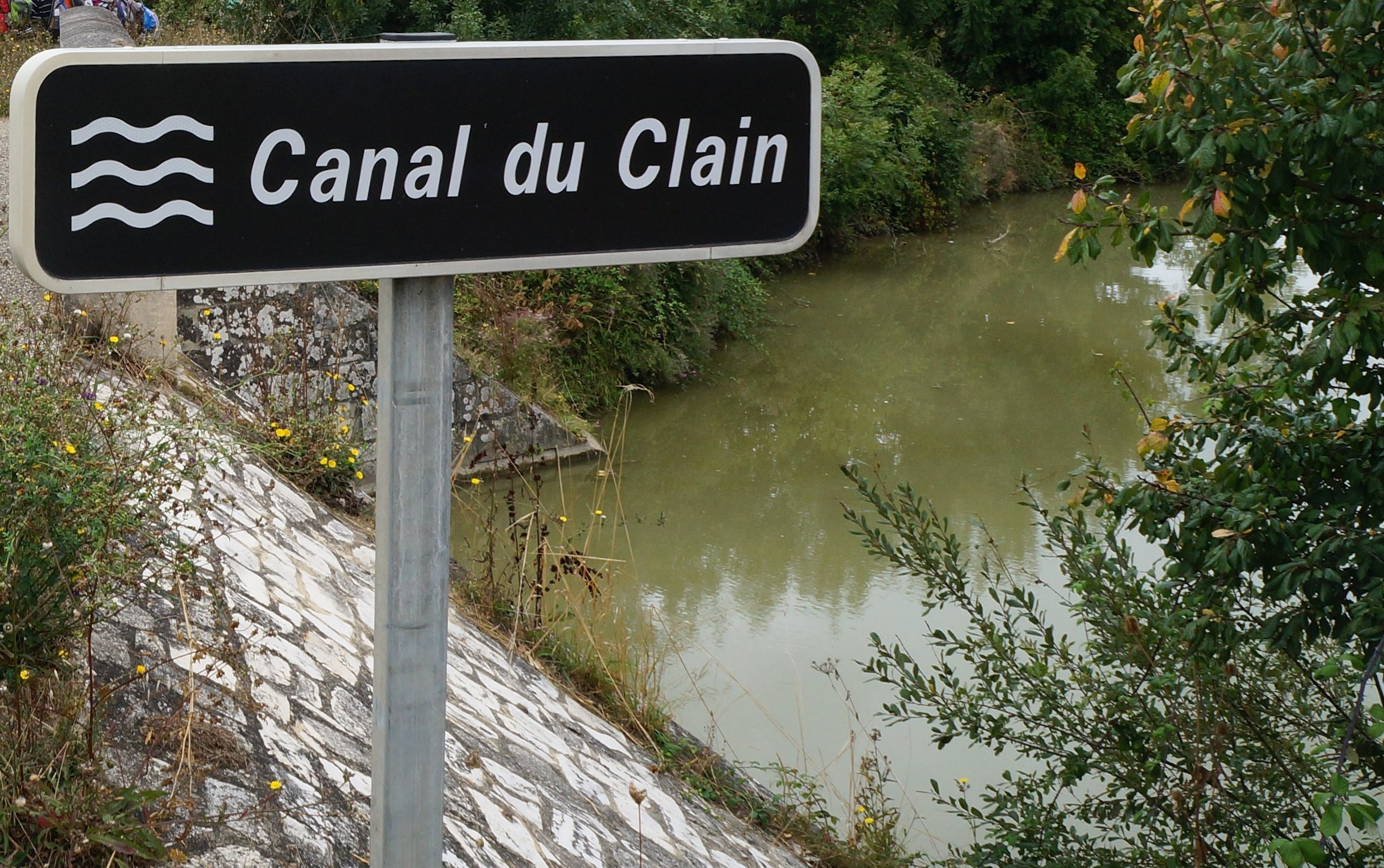 Canal du Clain Chaillé-les-Marais Vendée, Pays de la Loire.- France